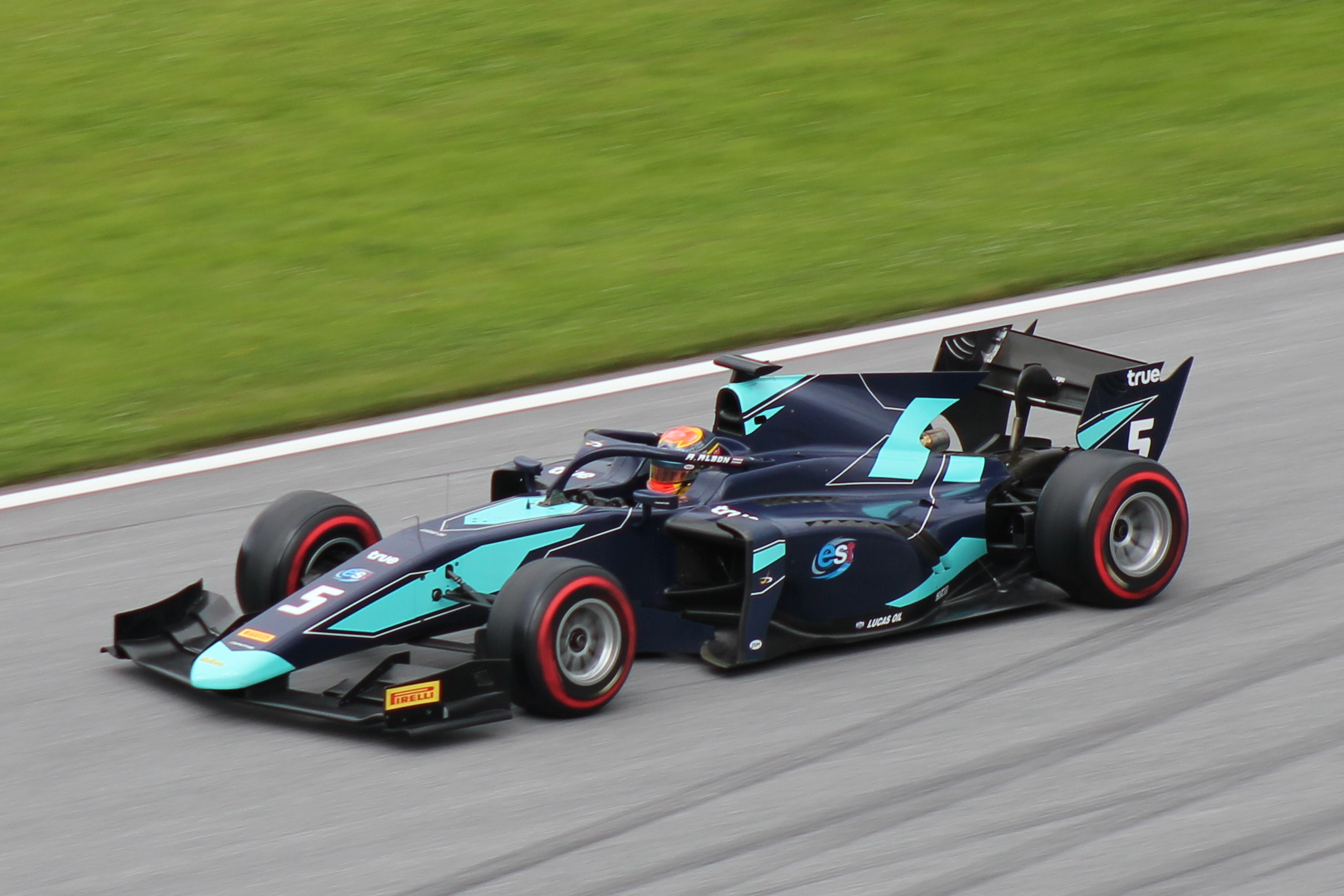 05 Alexander Albon beim Rennwochenende in Österreich 2018 (2)